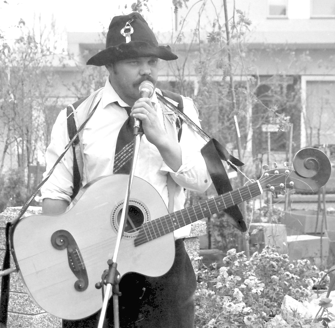 Jaakko Teppo keikalla Kuusankosken Viherpisteessä 21.5.1987